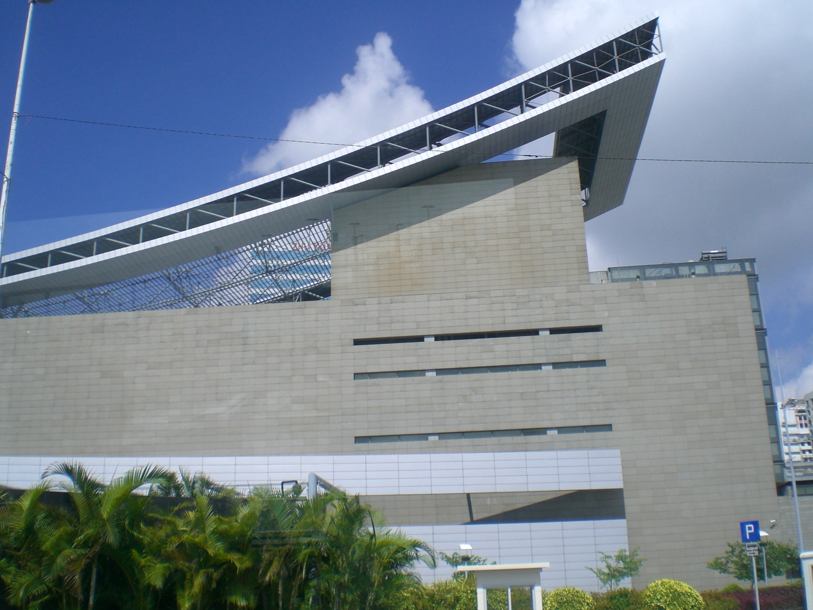 澳門半島 新口岸新填海區（葡文︰'Zona Nova de Aterros do Porto Exterior', 簡稱為'NAPE'）。